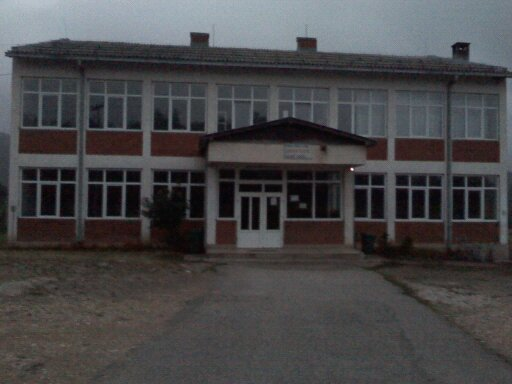 {| class="licensetpl" style="display:none" | |}